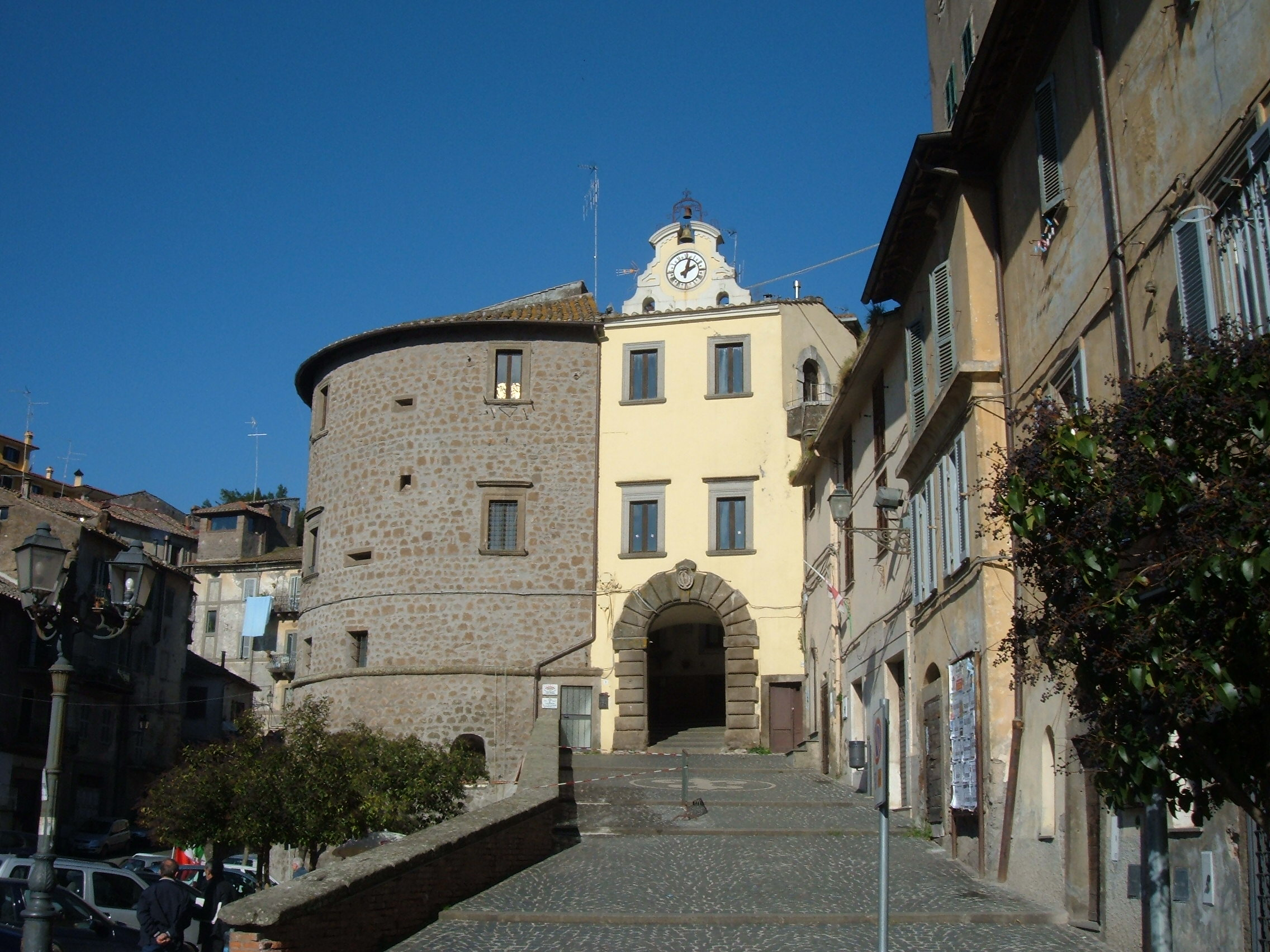 Vallerano